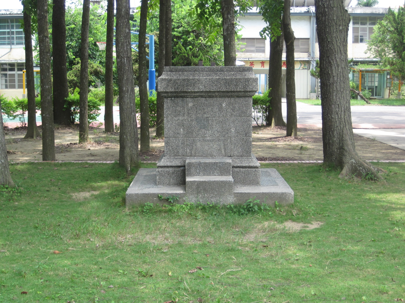 中文（台灣）: 臺灣臺南市後壁區菁寮國小日治升旗臺。